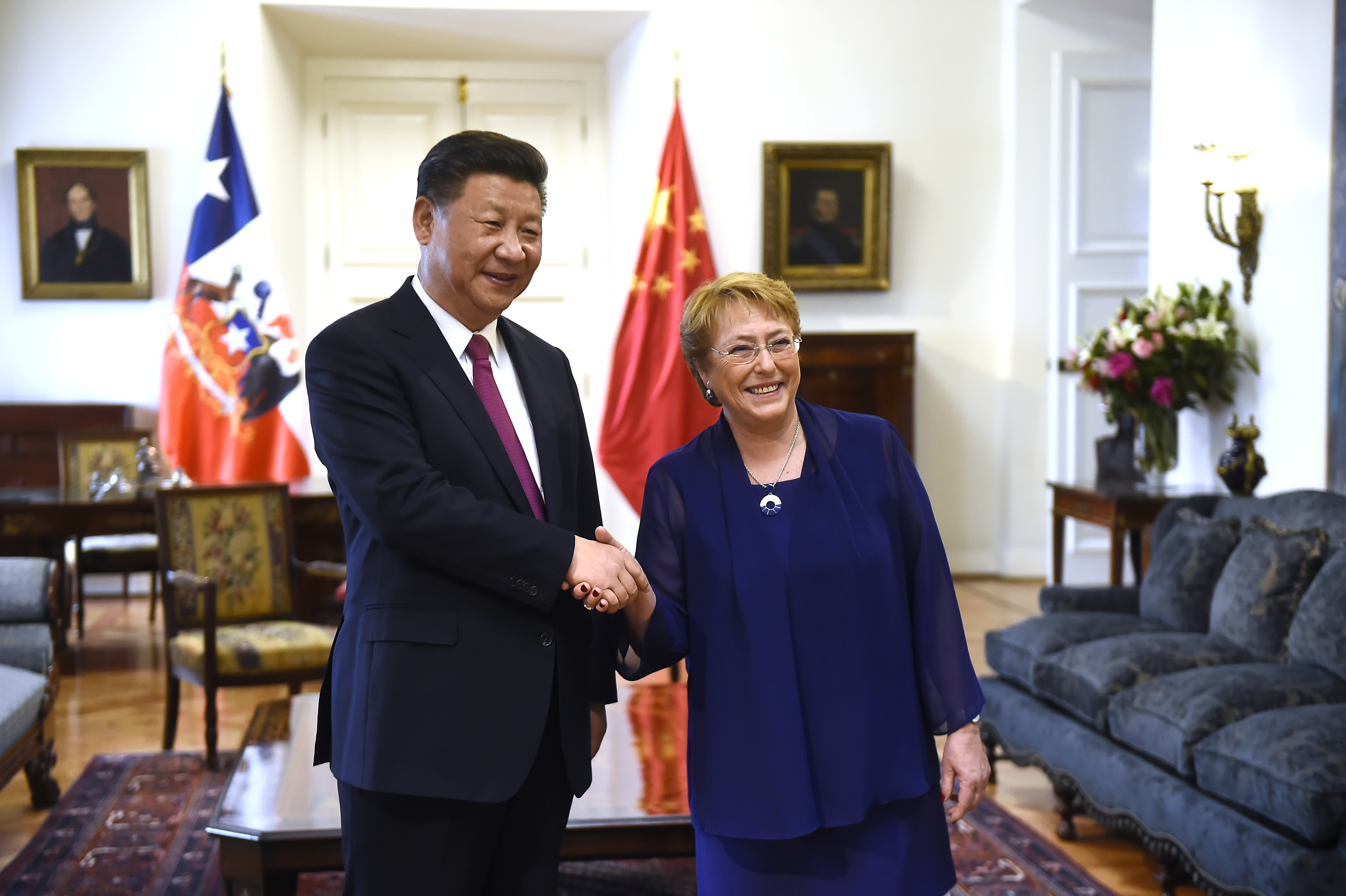 Gobierno de Chile